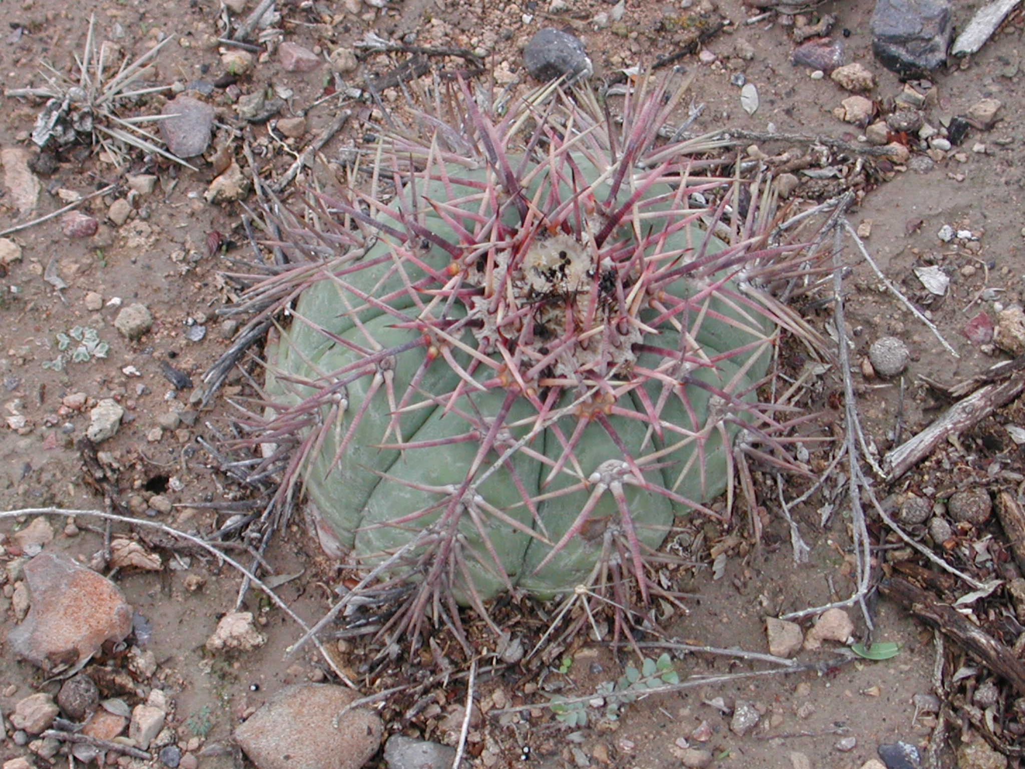 Echinocactus horizonthalonius, San Luis Potosí